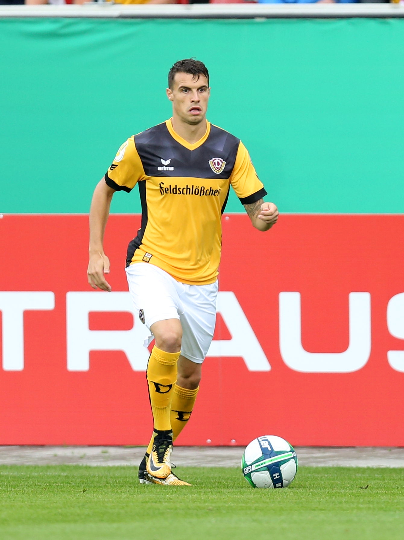 DFB-Pokal 2017/18, 1. Hauptrunde, TuS Koblenz gegen SG Dynamo Dresden: Philip Heise (SG Dynamo Dresden)